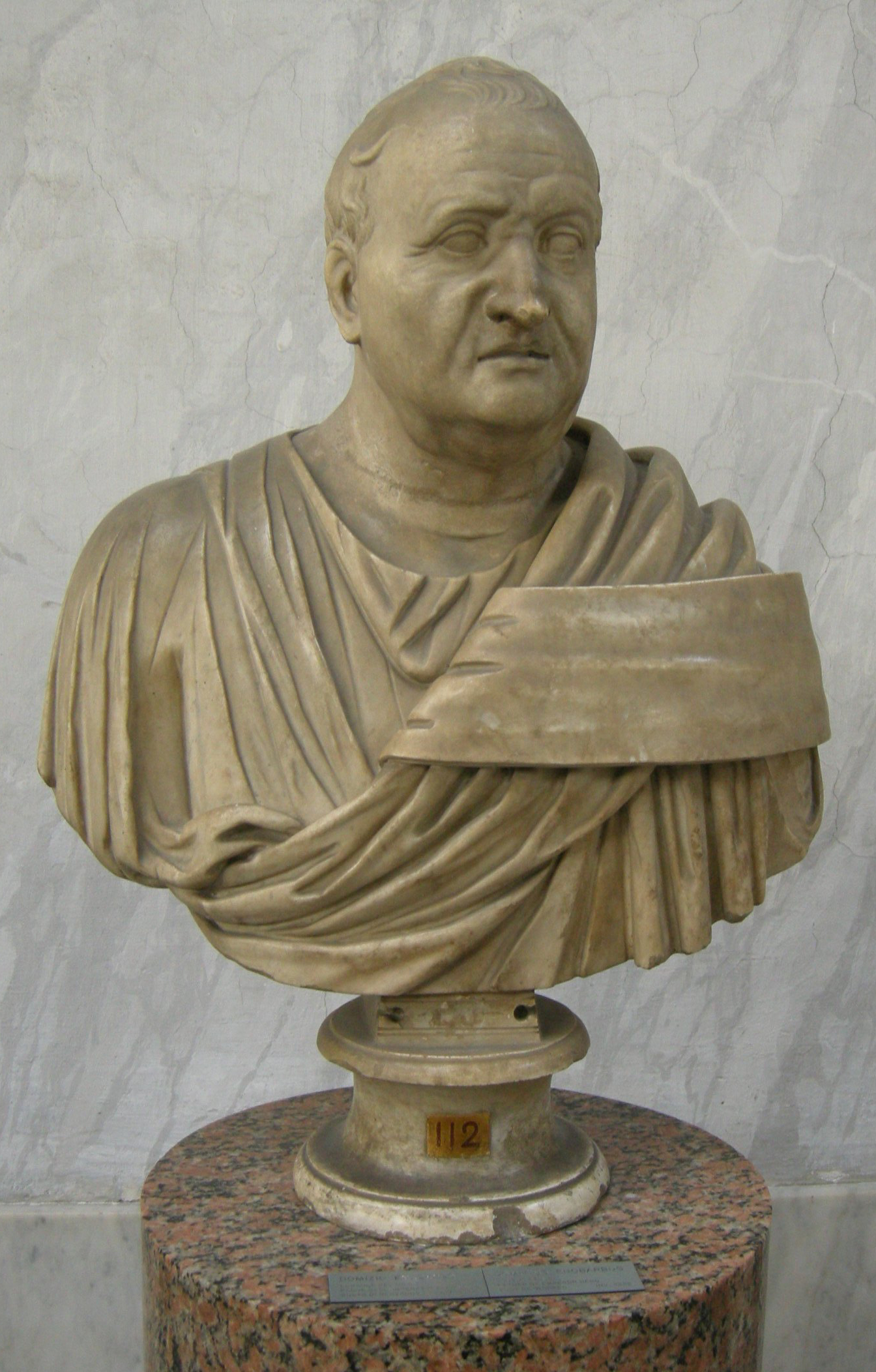 Ritratto di Domizio Enobarbo, padre di Nerone, su busto di restauro. Musei Vaticani, Museo Chiaramonti - Braccio Nuovo; inv. 2265.